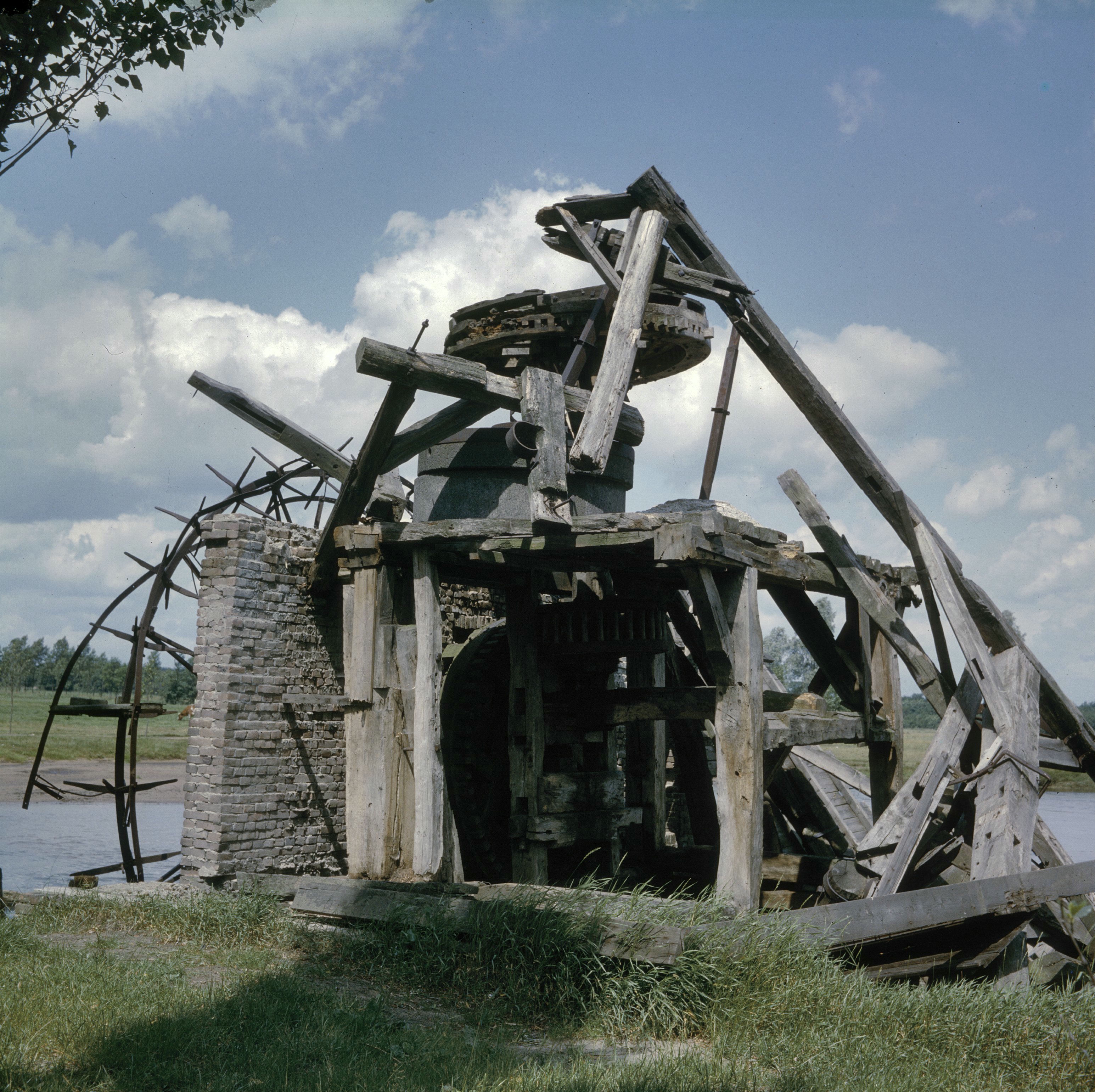 Volmolen: Overzicht, vervallen staat, is herbouwd op dezelfde plaats in 1992 (opmerking: Diacollectie Molens)